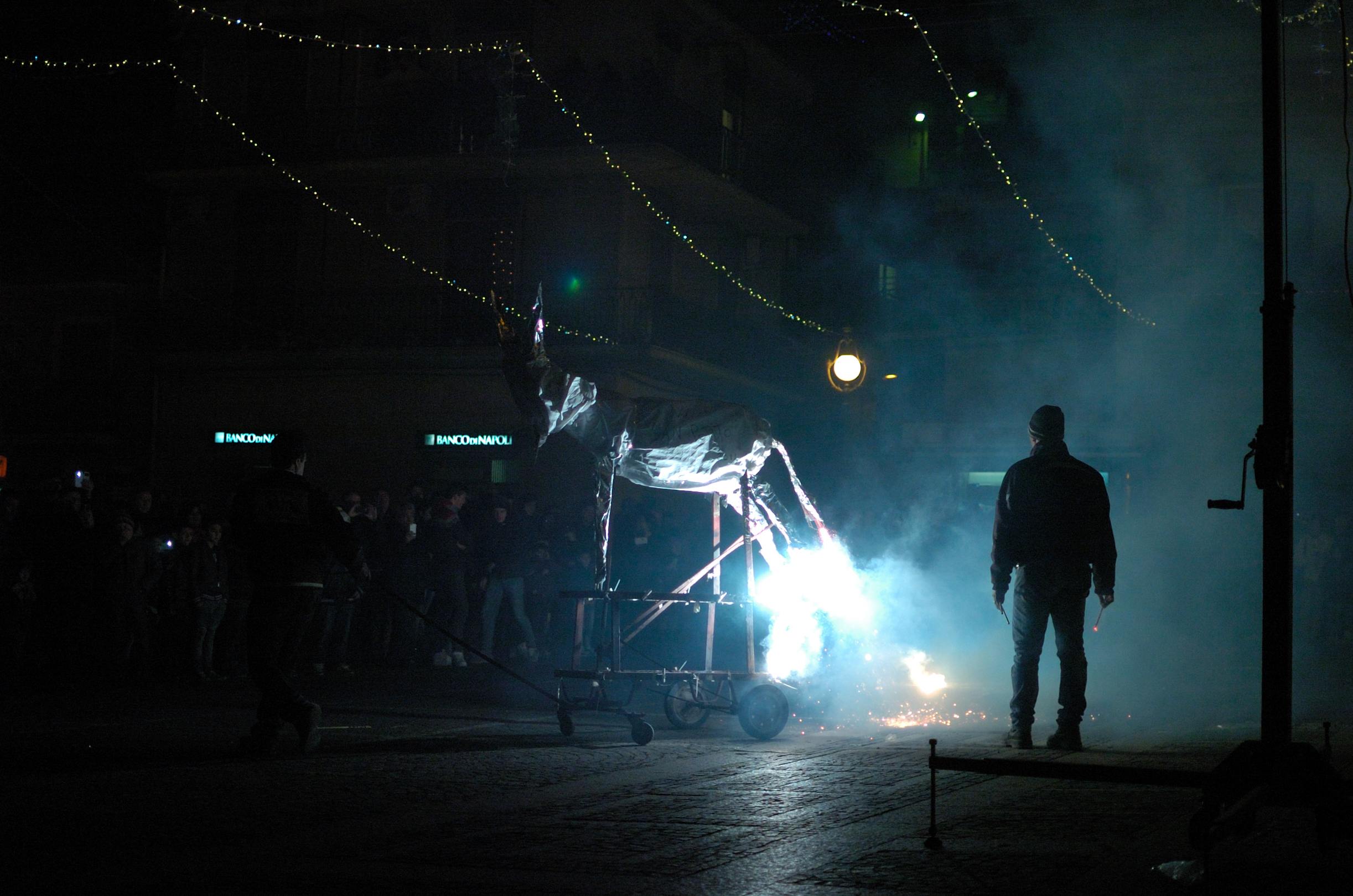 Tradizionale Ciuccio di San Potito